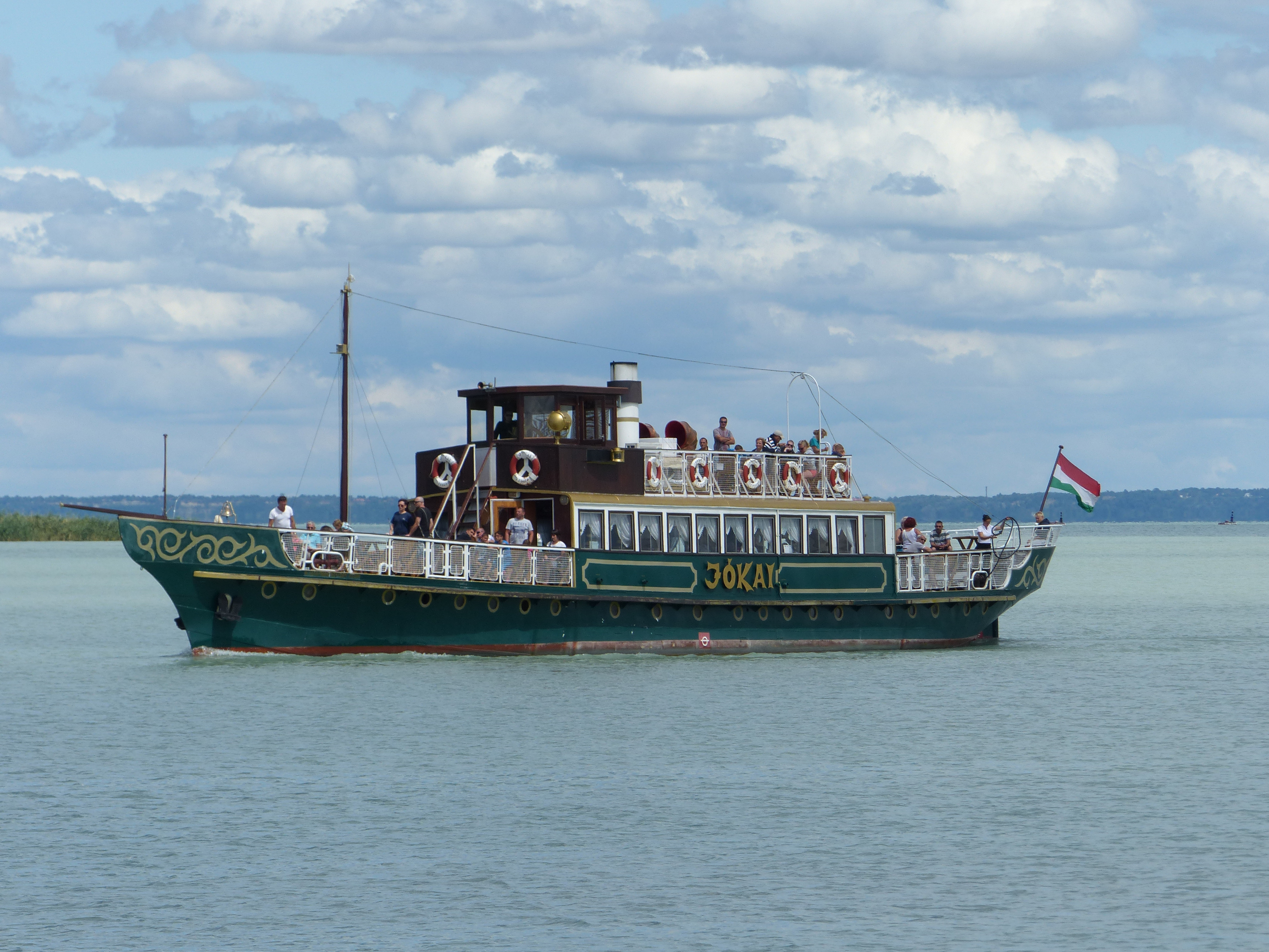 A felvétel 2016. július 14-én készült Balatonfüreden, a Kékszalag vitorlásverseny indulása előtt, a mólóról. Jókai csavargőzös. 1913-tól építette az Első Dunagőzhajózási Társaság (DDSG) óbudai gyáregysége. A hajót alkatrészenként szállították Siófokra. 1913. június 28-án bocsátották vízre. Nevét Jókai Mór íróról kapta. Tulajdonosai: Balatontavi Gőzhajózási Rt. (1913-1926), Balatoni Hajózási Rt. (1926-1945), Balatoni Hajózási Vállalat (1948-1955), MAHART – Magyar Hajózási Rt. (1955-1963), MAHART Balatoni Hajózási Üzemigazgatóság (1963-1980), Vanyolai Hajózási Kft. (1999- ) Források: 100-éves a Jókai (hozzáférés: 2016.08.09) (hozzáférés: 2016.08.09). Címkék: Vanyolai Sándor Vanyolai Hajózási Kft. Jókai csavargőzös